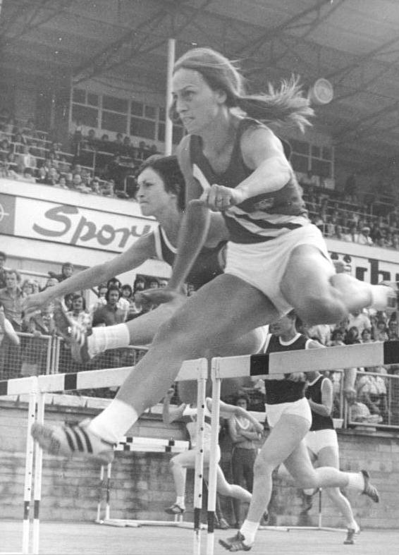 Johanna Klier, Annerose Fiedler ADN-ZB Kluge -2.7.77 Dresden: DDR-Leichtathletik-Meisterschaften-3.Tag- Olympiasiegerin Johanna Klier (SC Turbine Erfurt, r.) gewann den 100-m-Hürdenlauf in der Weltjahresbestzeit von 12,91 s vor ihrer Klubkameradin Annerose Fiedler (daneben) .